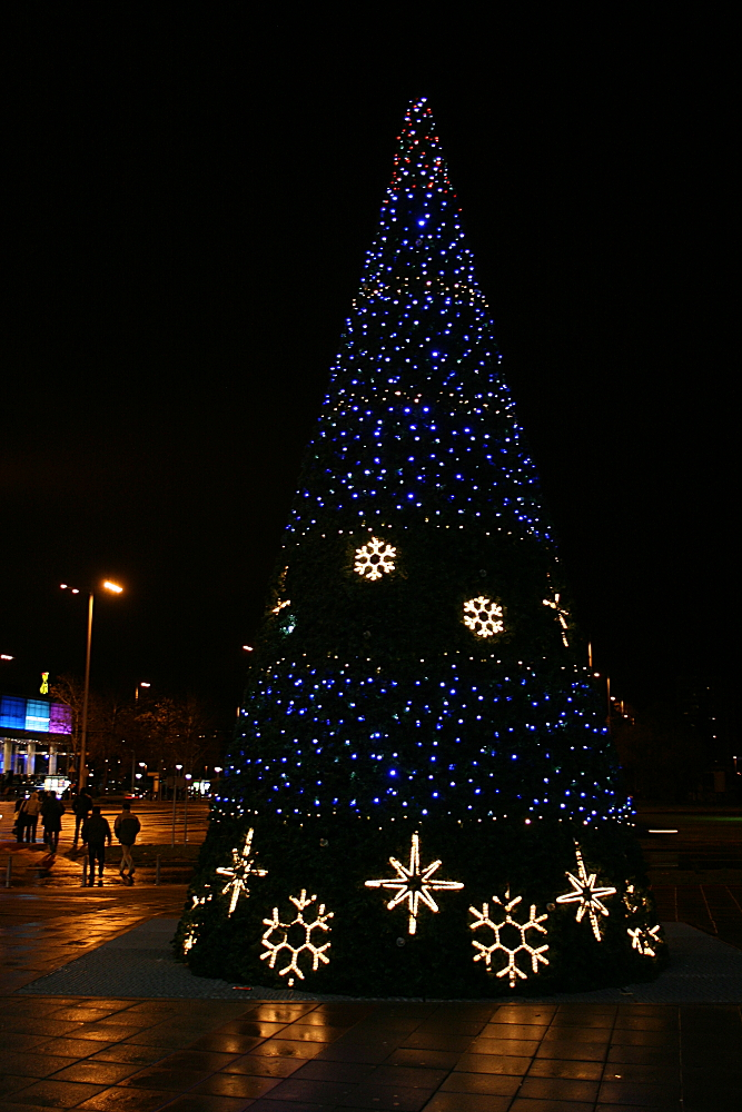 Božićno drvce u Aveniji Dubrovnik u Zagrebu